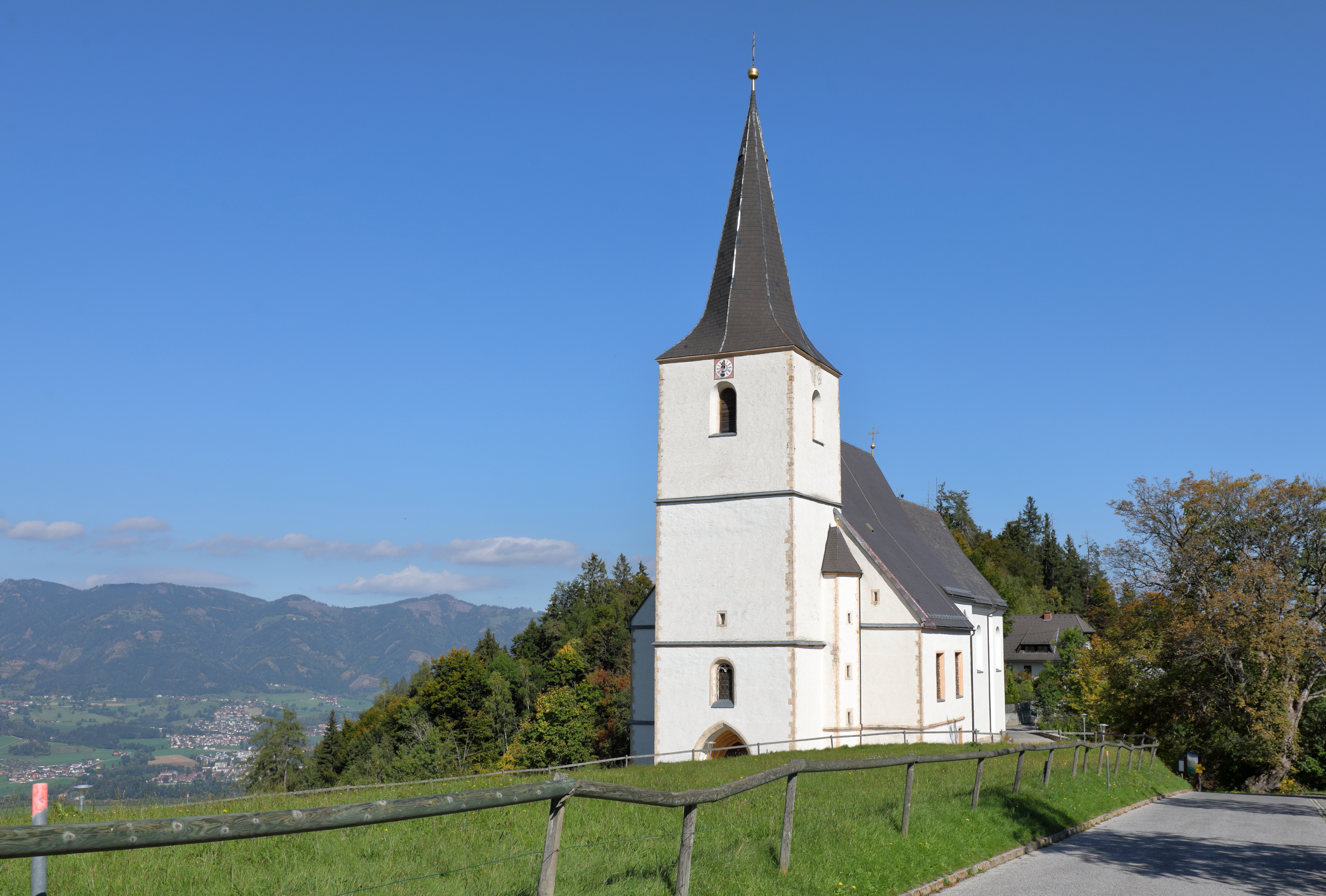 Südansicht der röm.-kath. Pfarr- und Wallfahrtskirche Maria Rehkogel in Frauenberg, ein Ortsteil der steirischen Marktgemeinde St. Marein im Mürztal. Die Kirche wurde von 1489 bis 1496 errichtet und 1769 mit einem barocken dreijochigen Chorraum erweitert.